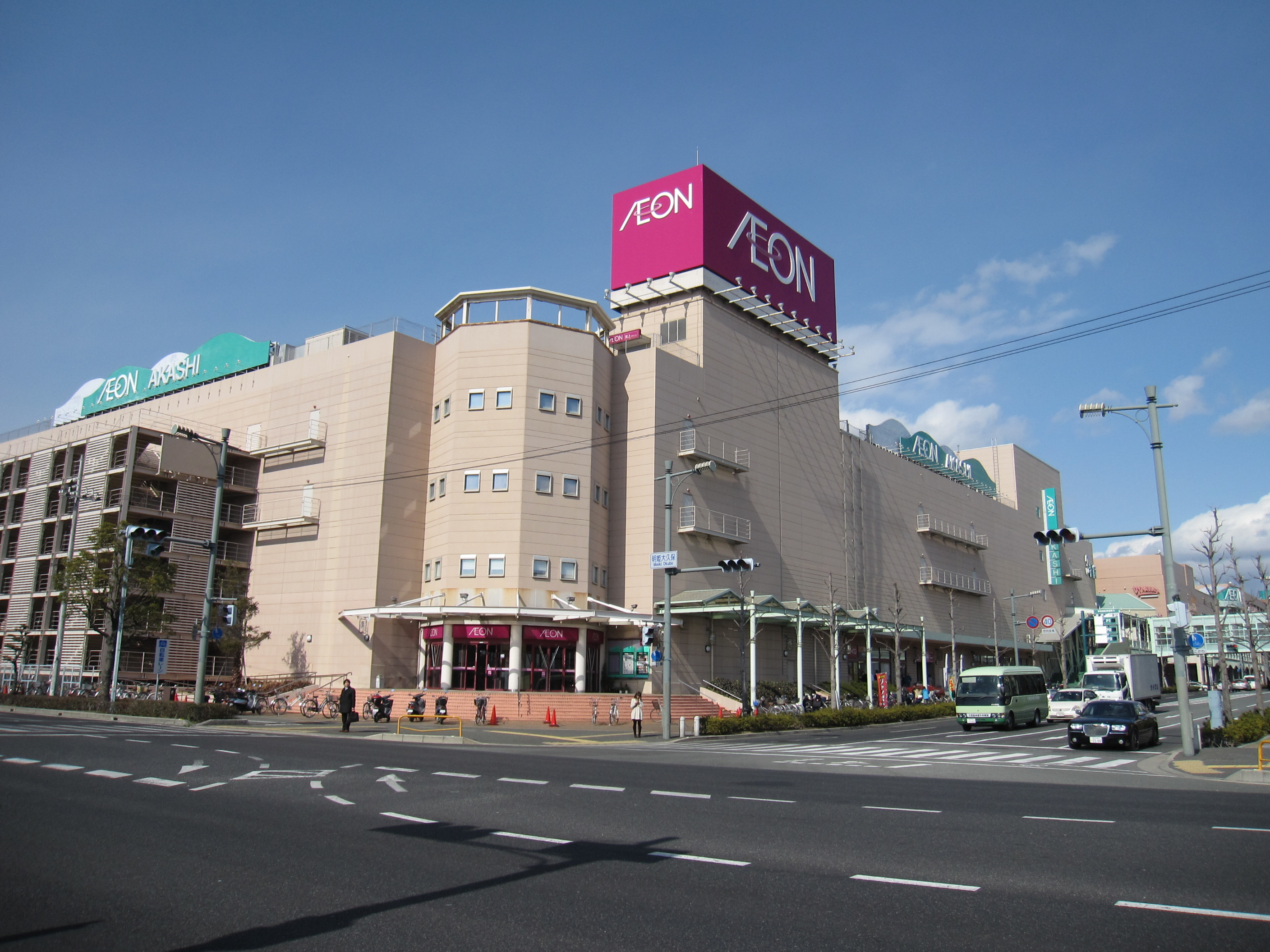 イオン明石ショッピングセンター